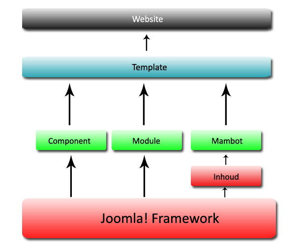 Visualisering van de structuur van het Open Source Content Management Systeem Joomla!. Gebruikt voor toelichting bij het artikel van joomla. Zelgemaakte afbeelding